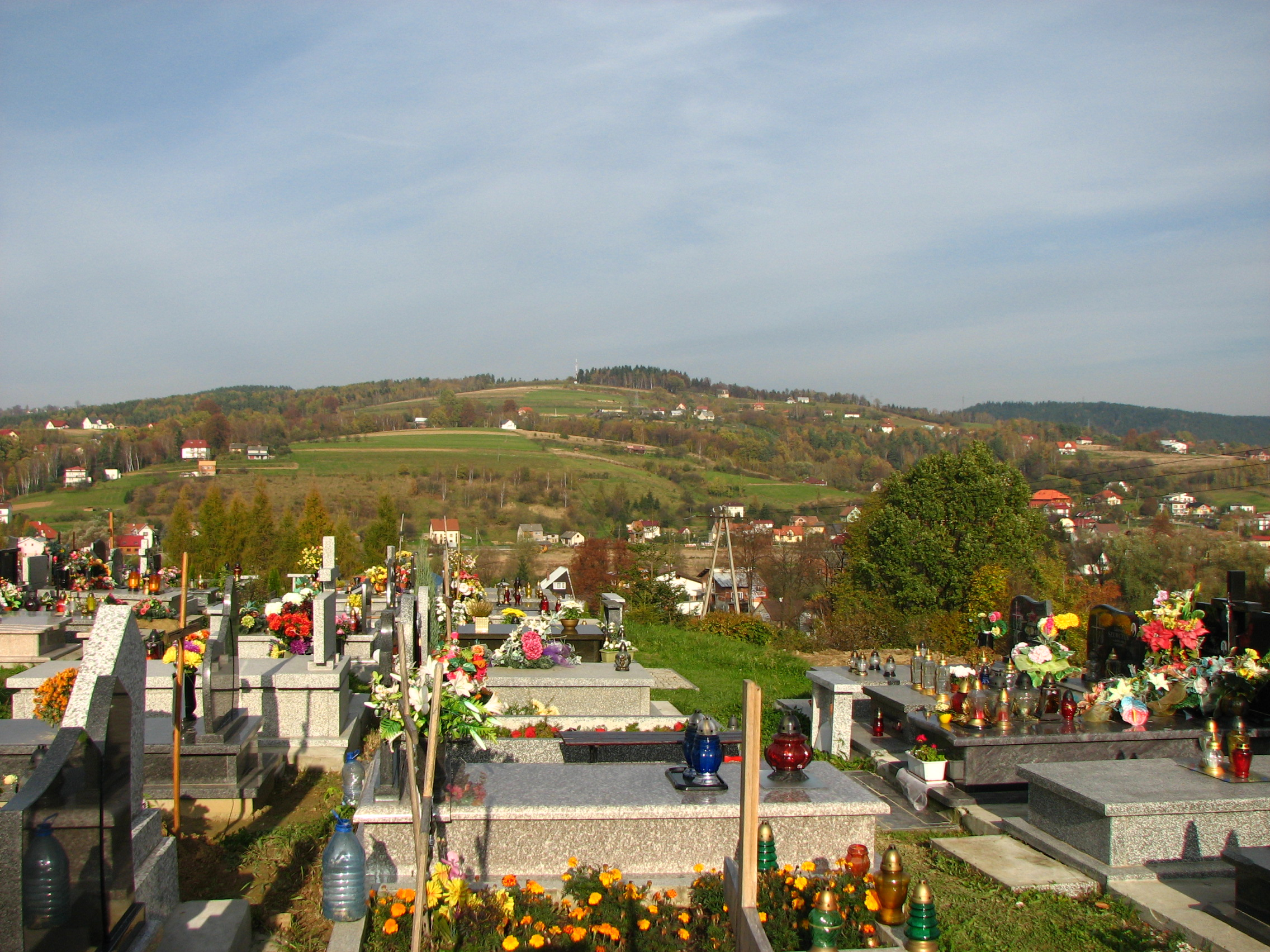 Szczyt Mużeń na Pogórzu Rożnowskim. Widok z cmentarza w Gołąbkowicach - dzielnicy Nowego Sącza.